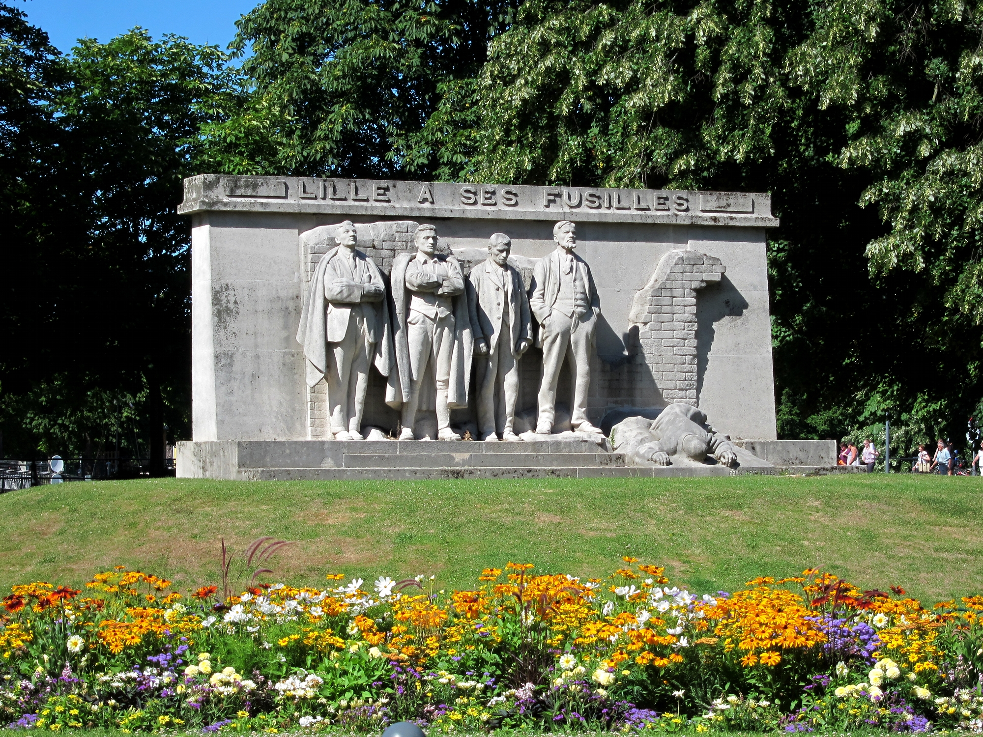 Lille (département du Nord) – Le Monument aux Fusillés, 1929. De gauche à droite : Sylvère Verhulst, Ernest Deconinck, Georges Maertens, Eugène Jacquet et Léon Trulin , scuplture de Félix Desruelles. Fortement endommagé par les allemands en 1940, le monument est restauré en 1960 par Germaine Oury-Desruelles.